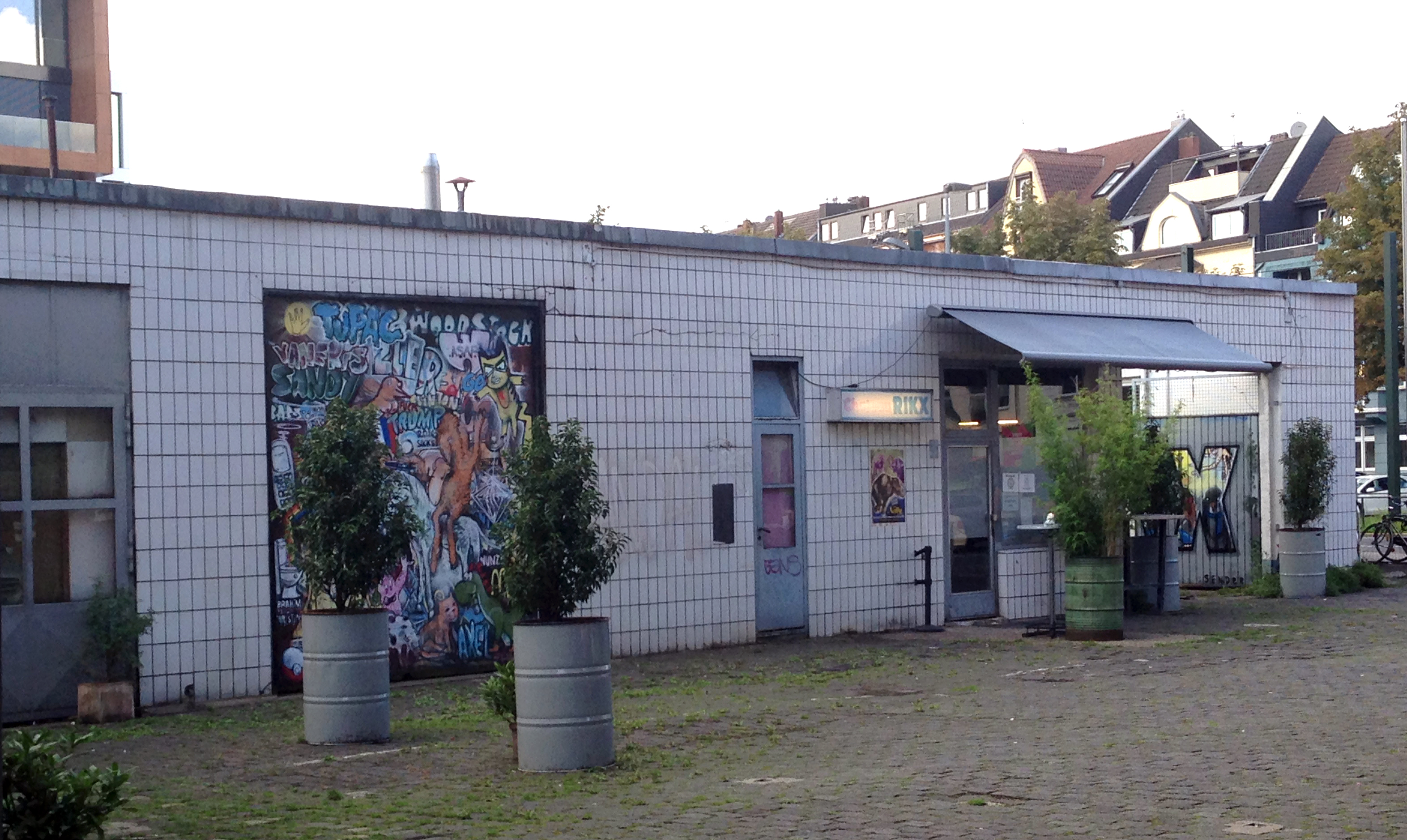 vor dem Château Rikx, Belsenplatz 2a, Düsseldorf-Oberkassel